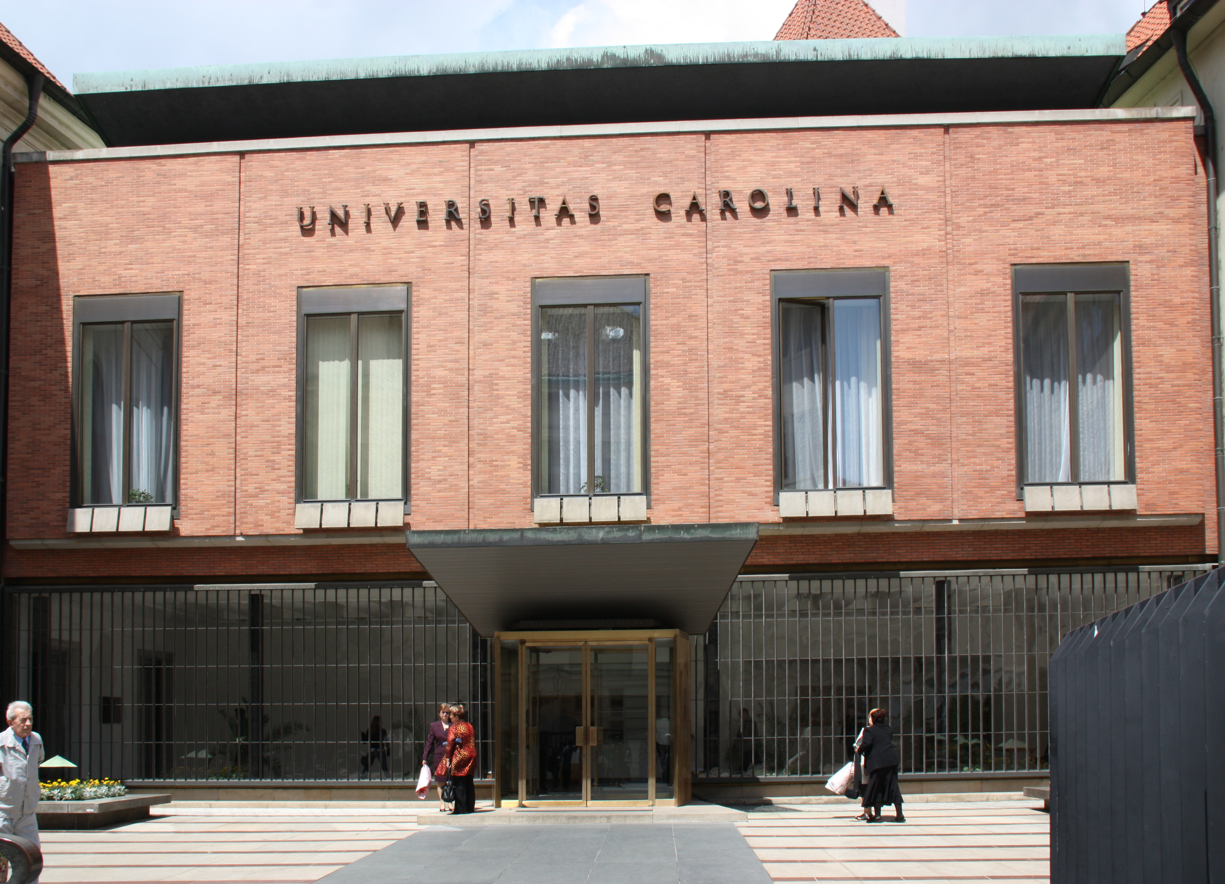 Karls Universität Prag